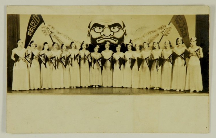 1935年1月に行われた新春ヴァライテイ・フィナーレ。